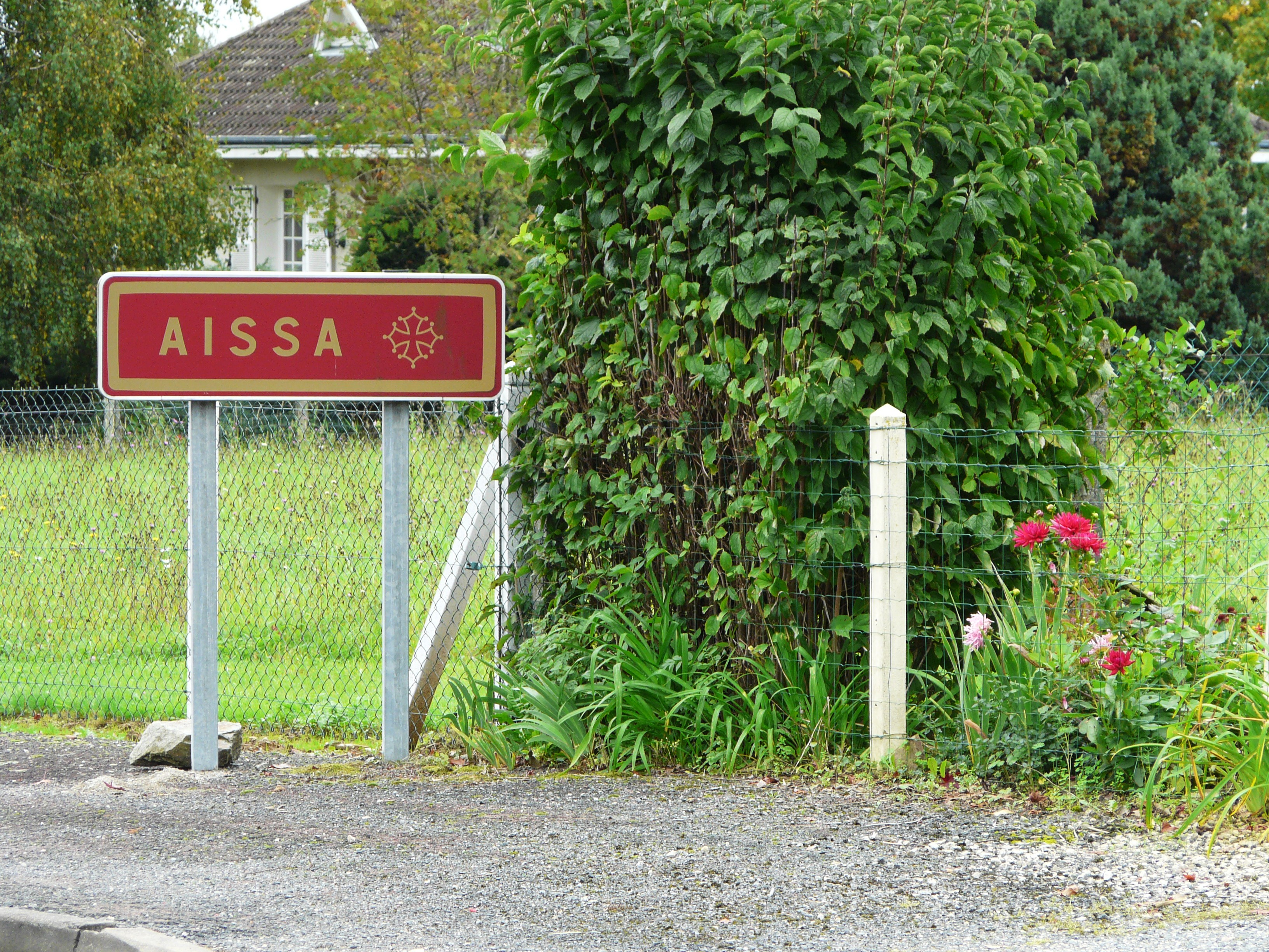 Panneau d'entrée en occitan à Aixe-sur-Vienne, Haute-Vienne, France.